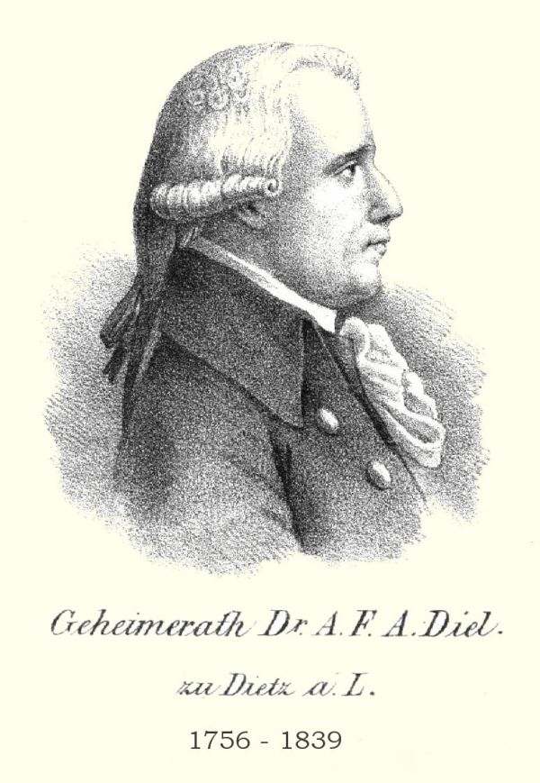 Zeichnung des Profils von Hadrian Diel (Pomologe)